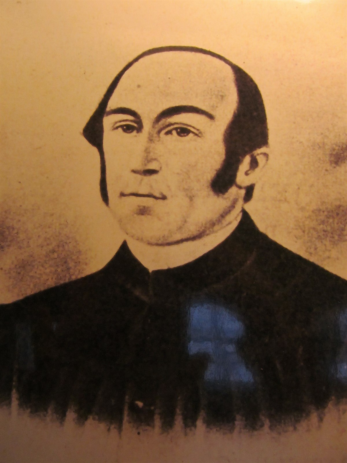 Josef Opočenský (1814-1870), evangelický fařář